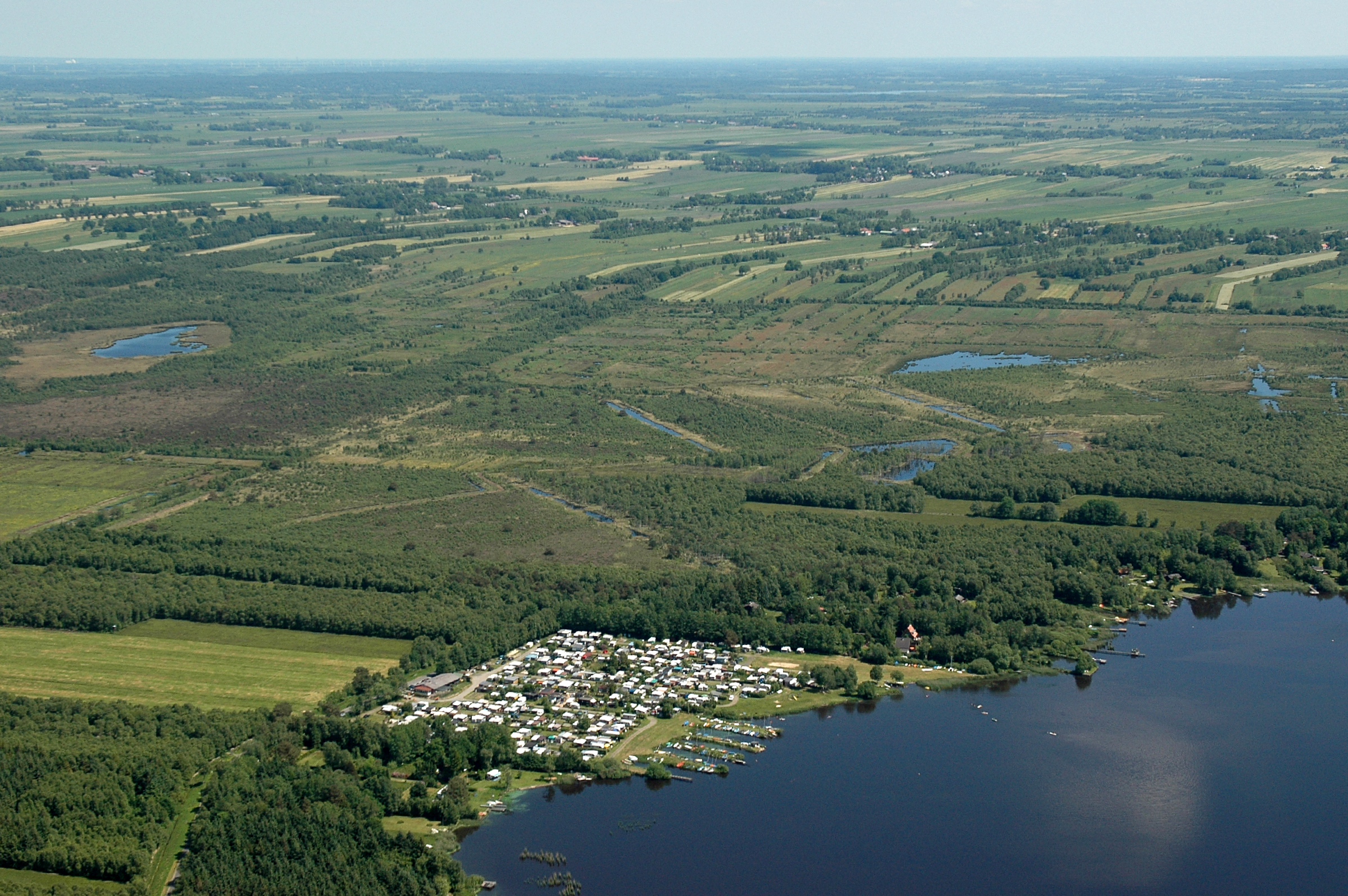 Ahlenmoor und Campingplatz am Flögelner See Fotoflug vom Flugplatz Nordholz-Spieka über Cuxhaven und Wilhelmshaven